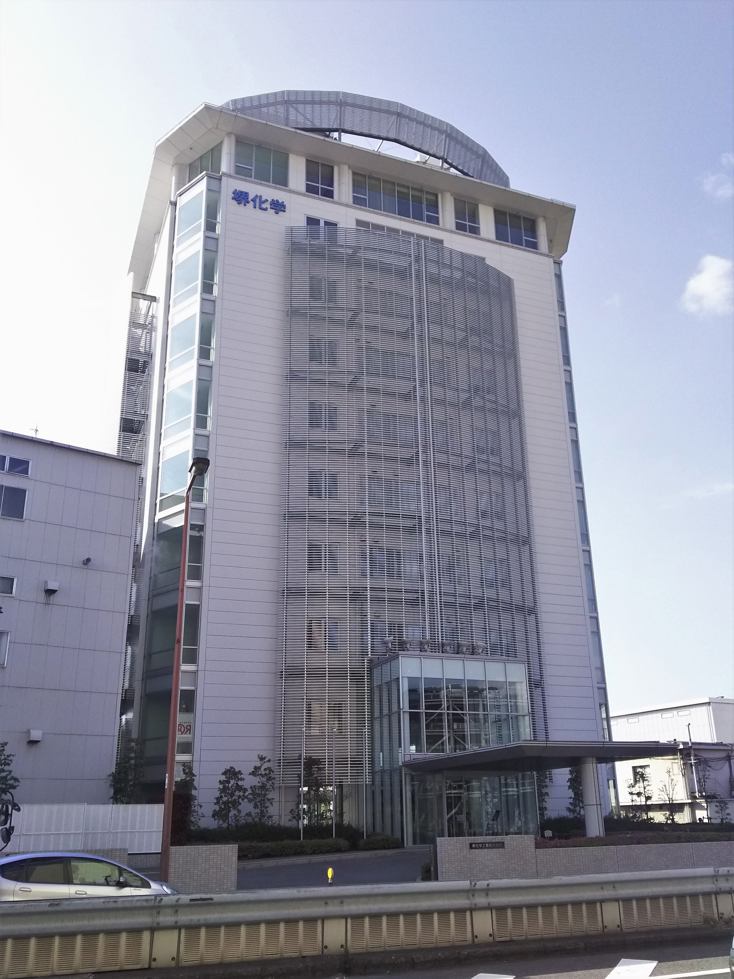 堺化学工業本社（堺市堺区）